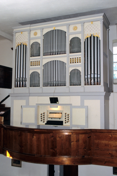 Prospekt der Herbrig-Orgel